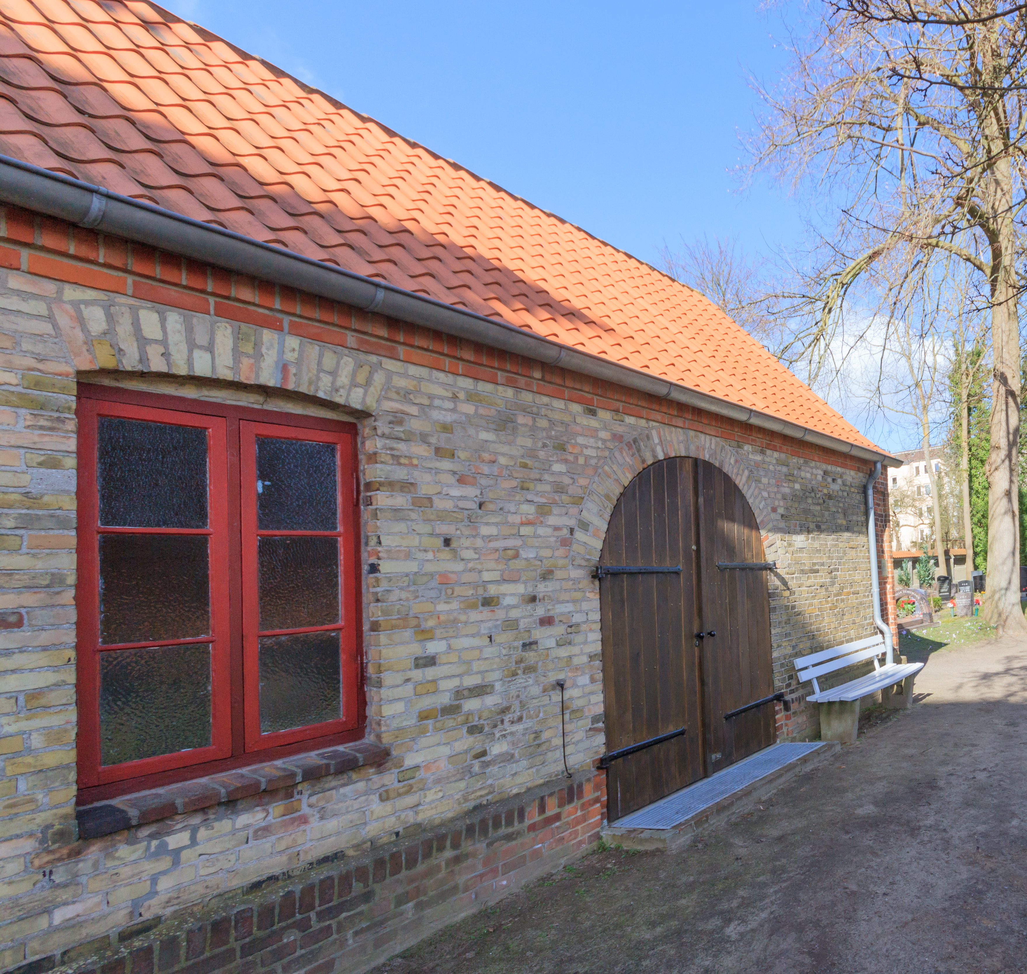 Die Leichenhalle mit kleinem Andachtsraum ließ die Gemeinde im Jahre 1887 nach Plänen des Architekten C. Amelow auf dem alten jüdischen Friedhof an der Michelsenstraße in Kiel errichten.